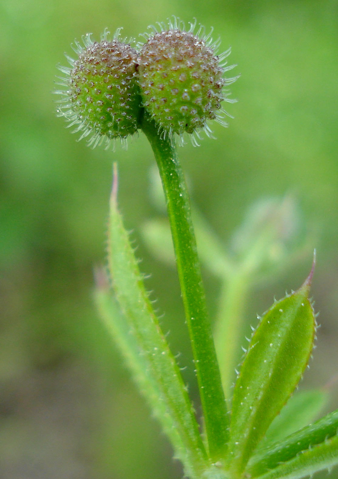 Galium aparine (Unterfranken, Germany)